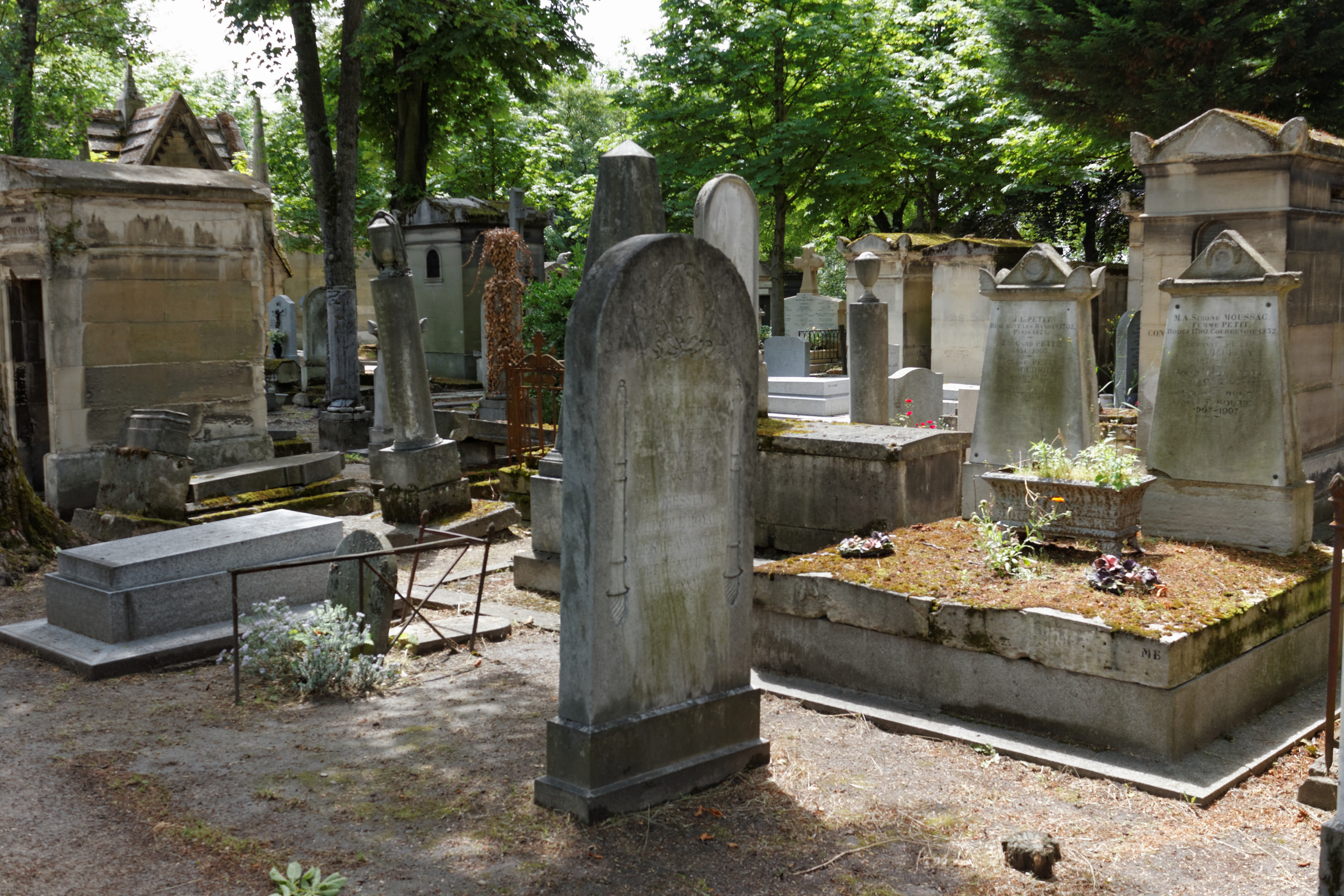 Vue d'ensemble